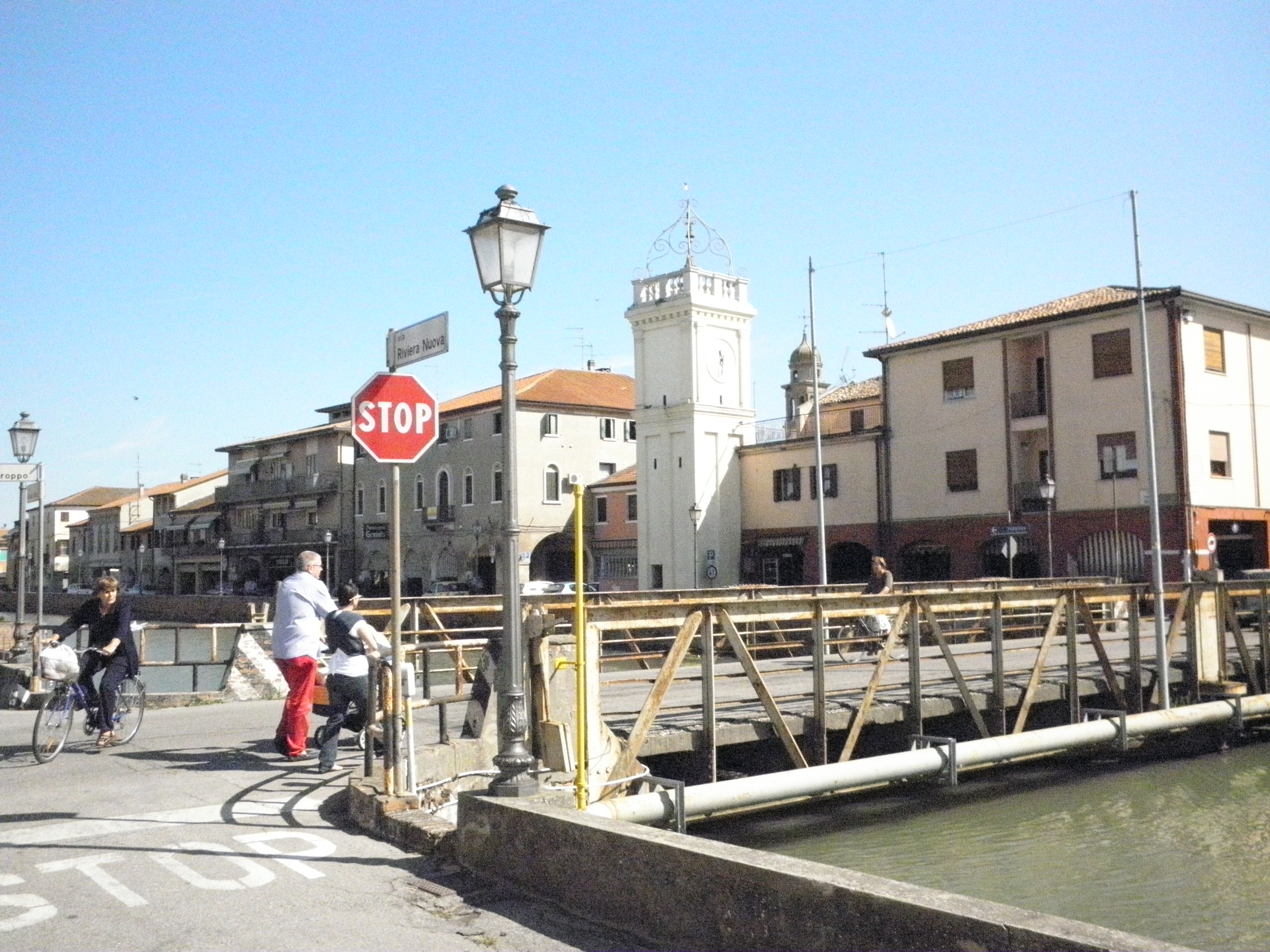 Loreo: il ponte mobile, ora però non più operativo, su Via Roma.